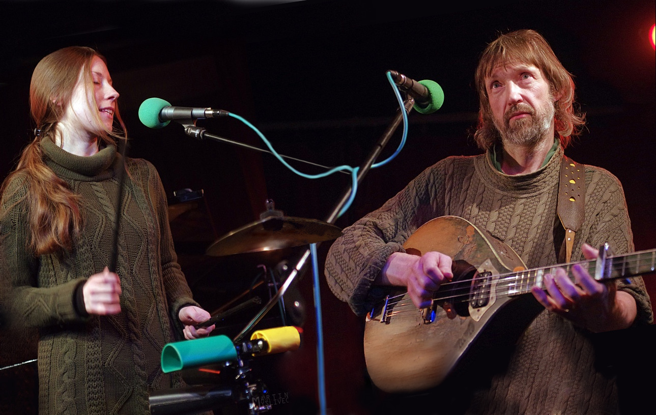 Caine-Mi